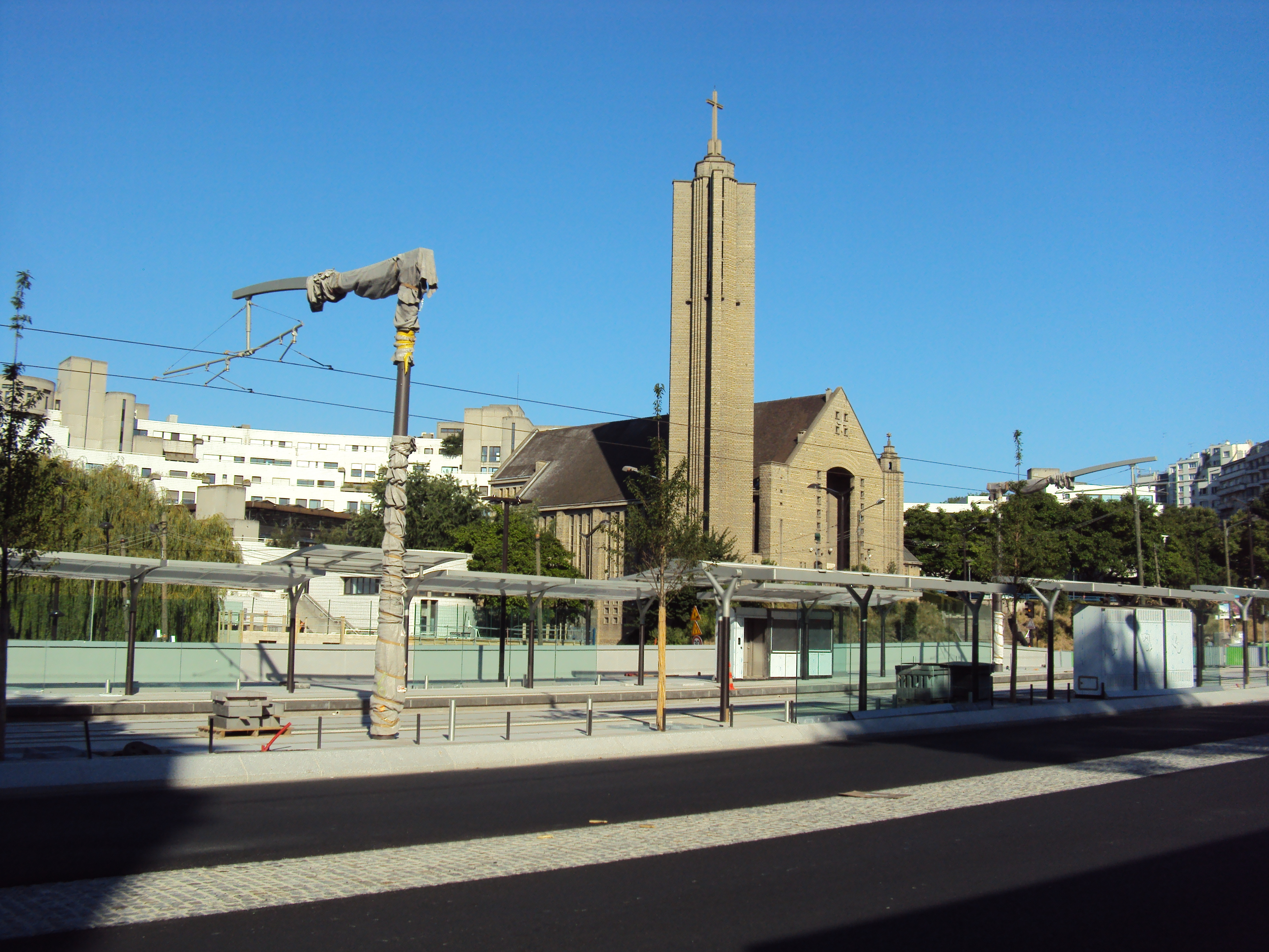 Station Hopital Robert Debré